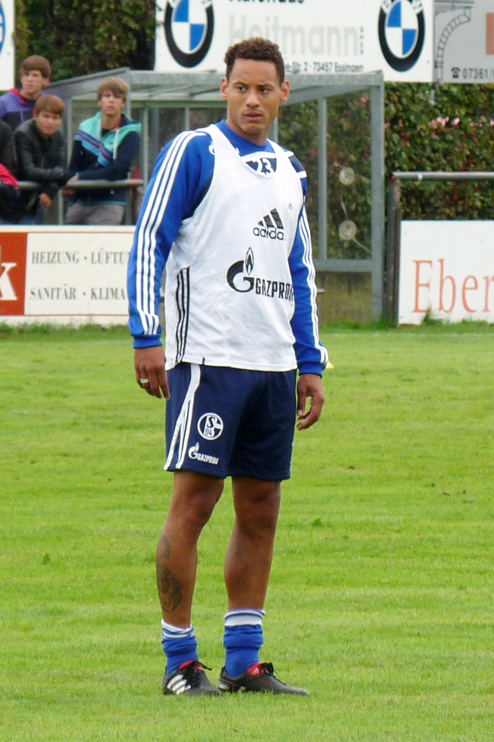 Jermaine Jones während einer Trainingseinheit